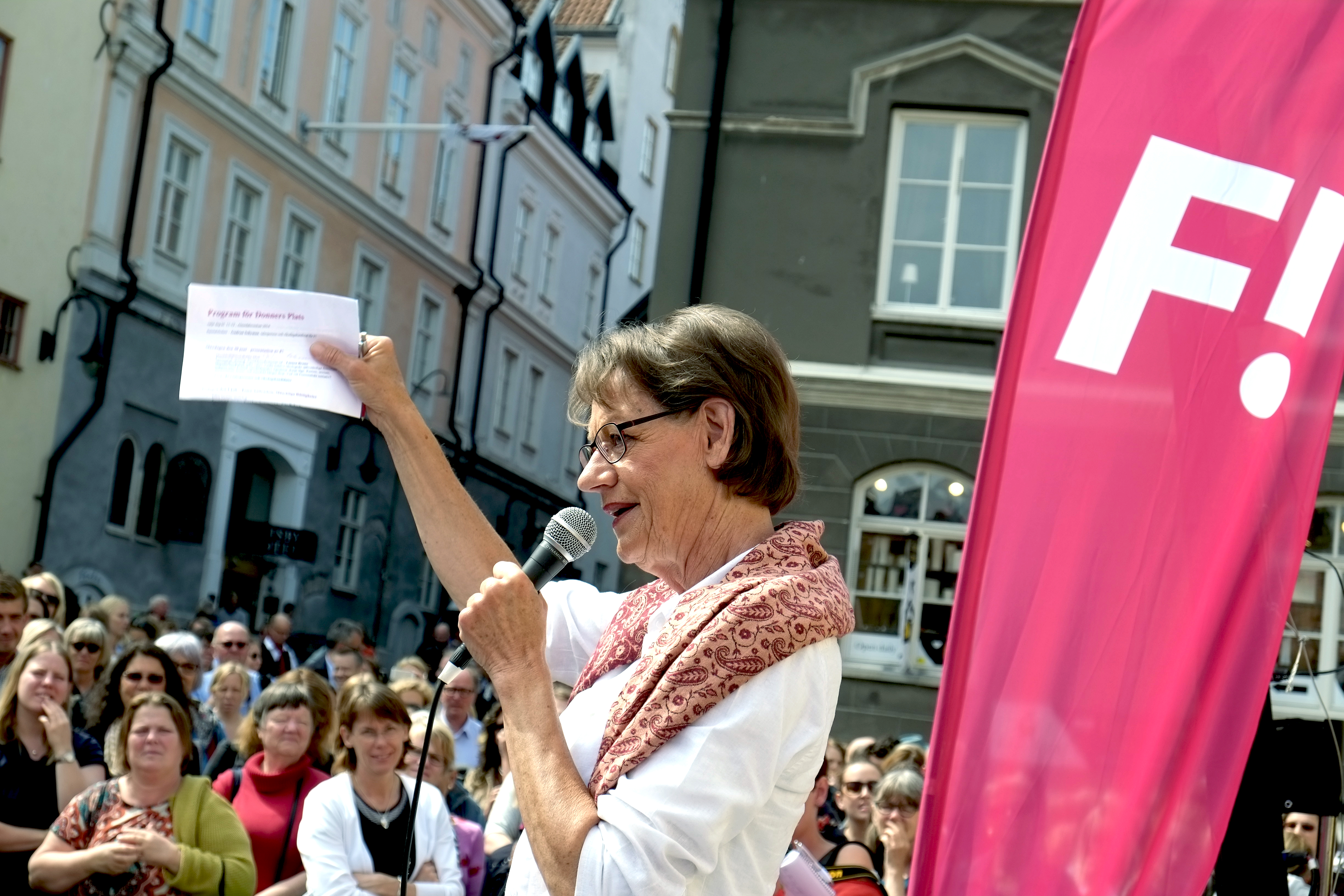 Gudrun Schyman, en av Feministiskt Initiativs tre talespersoner, talar 20140630 vid Donners Plats i Visby under Almedalsveckan. Foto: News Øresund - Johan Wessman © News Øresund(CC BY 3.0) Detta verk av News Øresund är licensierat under en Creative Commons Erkännande 3.0 Unported-licens (CC BY 3.0). Bilden får fritt publiceras under förutsättning att källa anges (Foto: News Øresund + fotografnamn). The picture can be used freely under the prerequisite that the source is given . News Øresund, Malmö, Sweden. News Øresund är en oberoende regional nyhetsbyrå som ingår i projektet Øresund Media Platform som drivs av Øresundsinstituttet i partnerskap med Lunds universitet och Roskilde Universitet och med delfinansiering från EU (Interreg IV A Öresund) och 14 regionala; icke kommersiella aktörer. غوردون شيمان تتحدث في فيسبي خلال أسبوع الميدالن